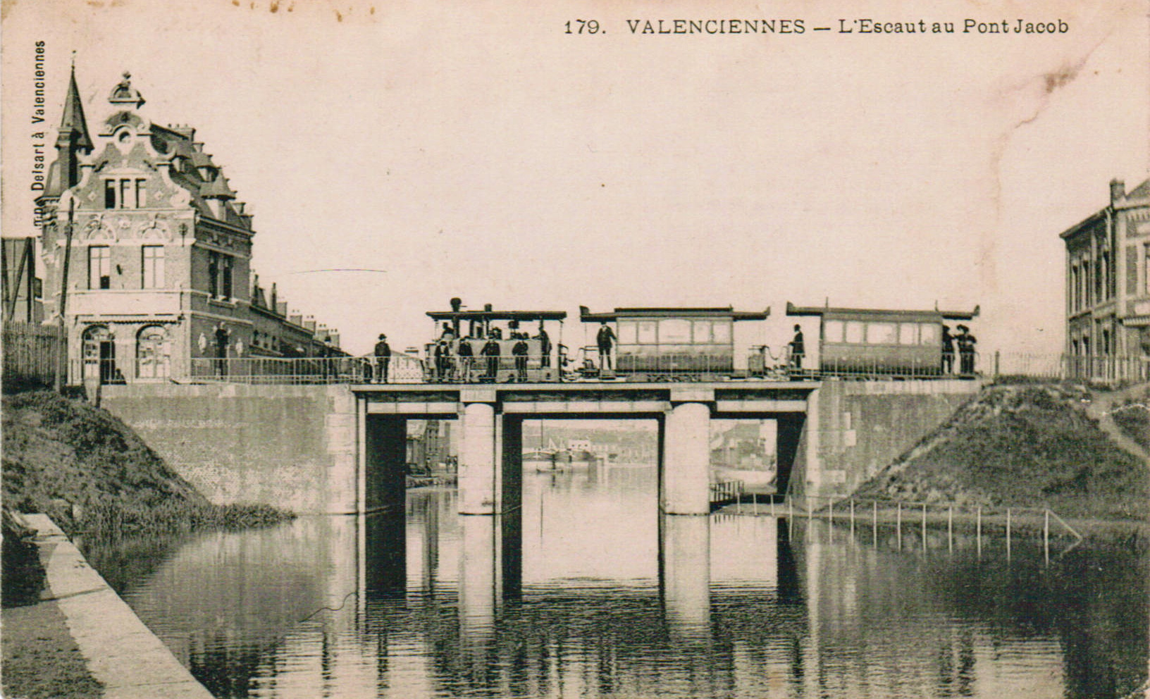 Carte postale ancienne éditée par Delsart à Valenciennes N° 179VALENCIENNES : L'Escaut au pont JacobVue sur le plan d'un tramway de Valenciennes, tracté par une locomotive bicabine à vapeur